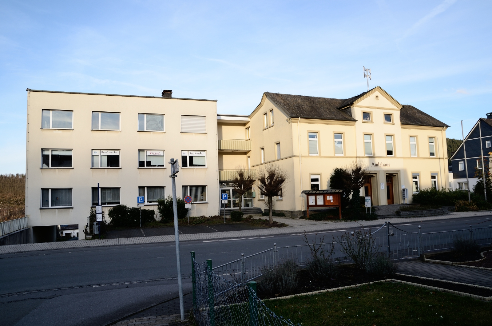 Gebäude in Freienohl (Altes Amtshaus), Meschede im Hochsauerlandkreis, Nordrhein-Westfalen